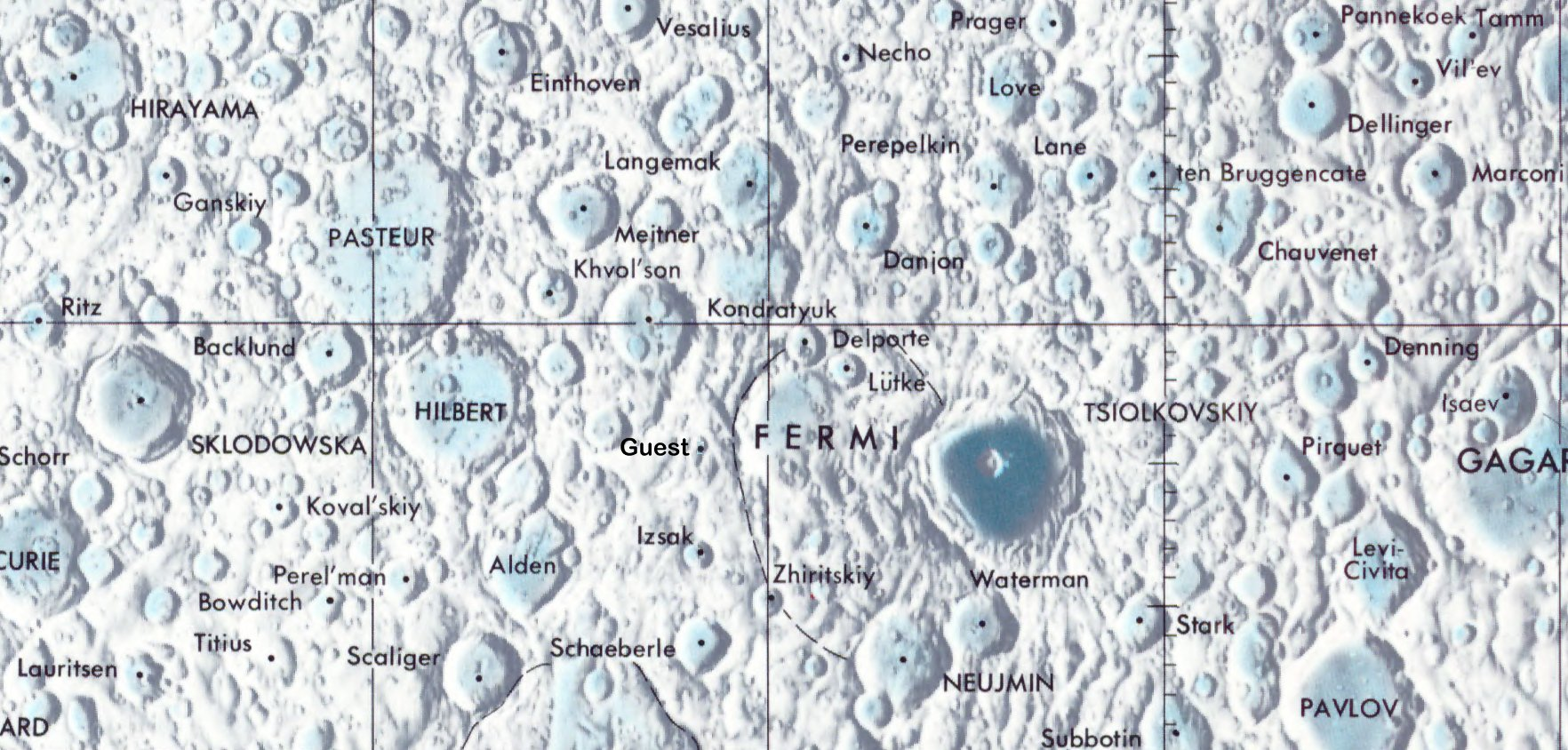 Cráter lunar Guest. Localización. (Lunar Chart LPC1. Second Edition)